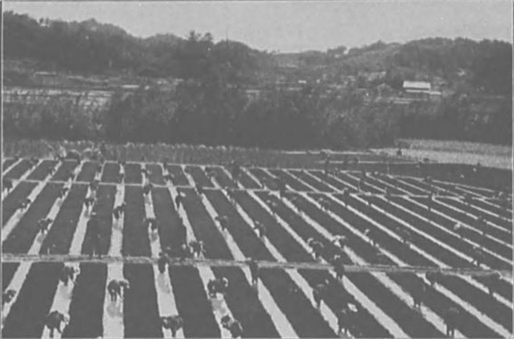 伴谷村共同稲苗代（滋賀県甲賀郡水口町）1910年頃